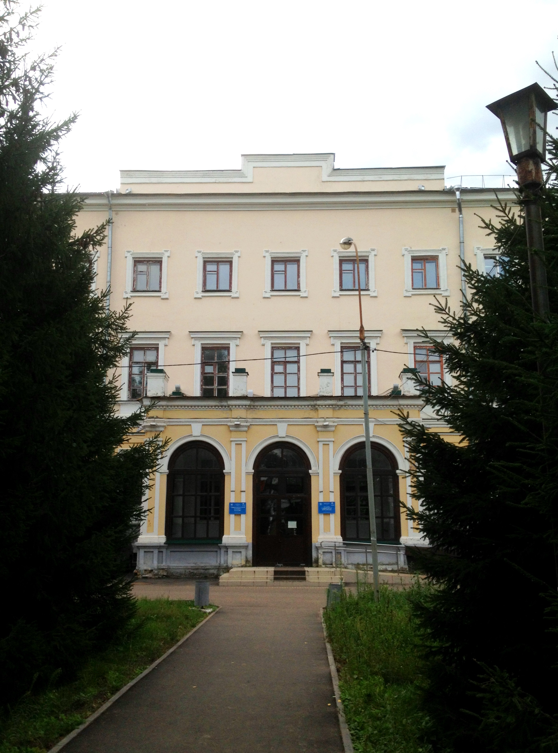 Здание казанской духовной академии: улица Н. Ершова, 2, Казань, Татарстан